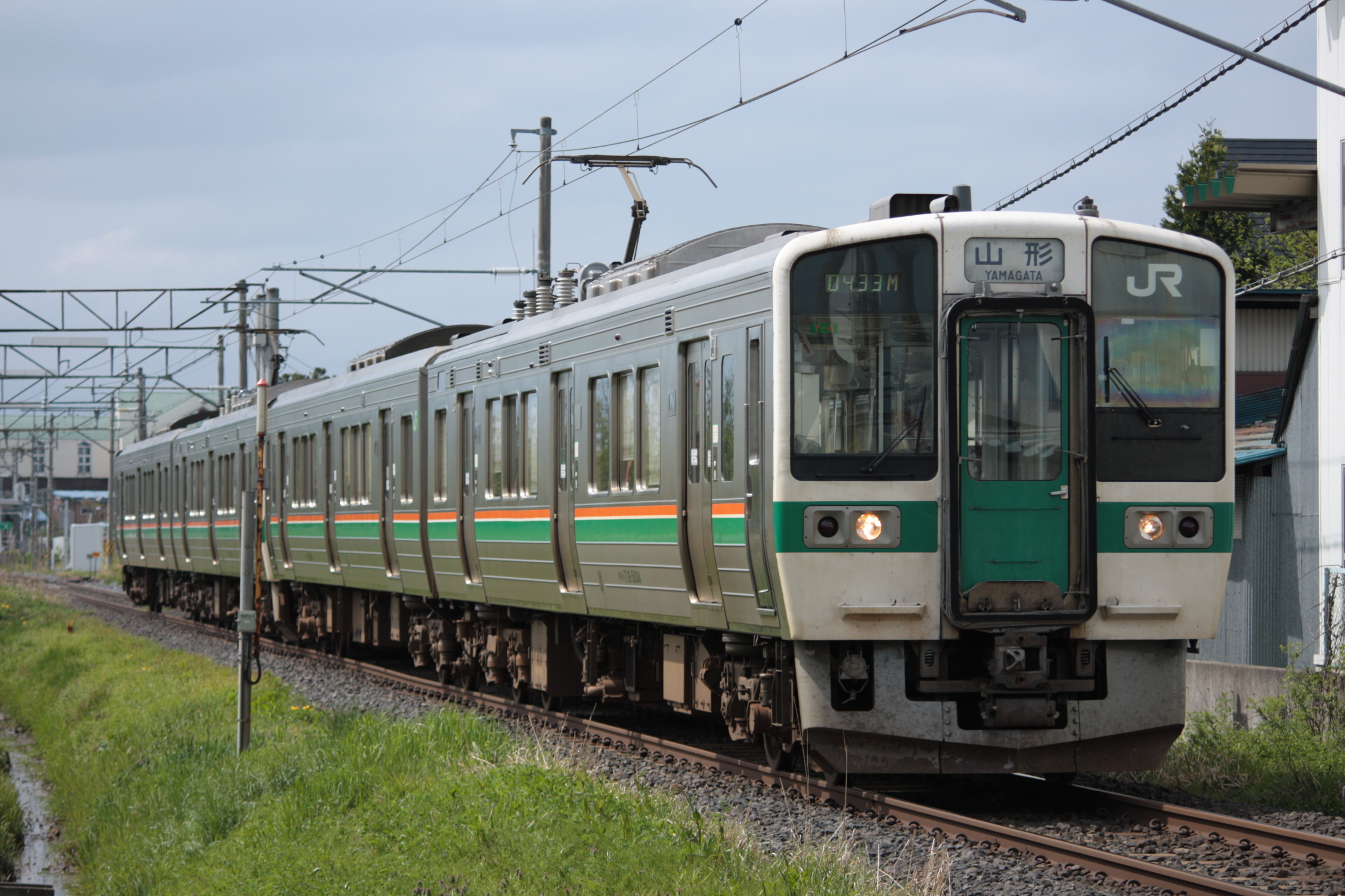 719系5000番台（山形線・高畠～赤湯間にて）